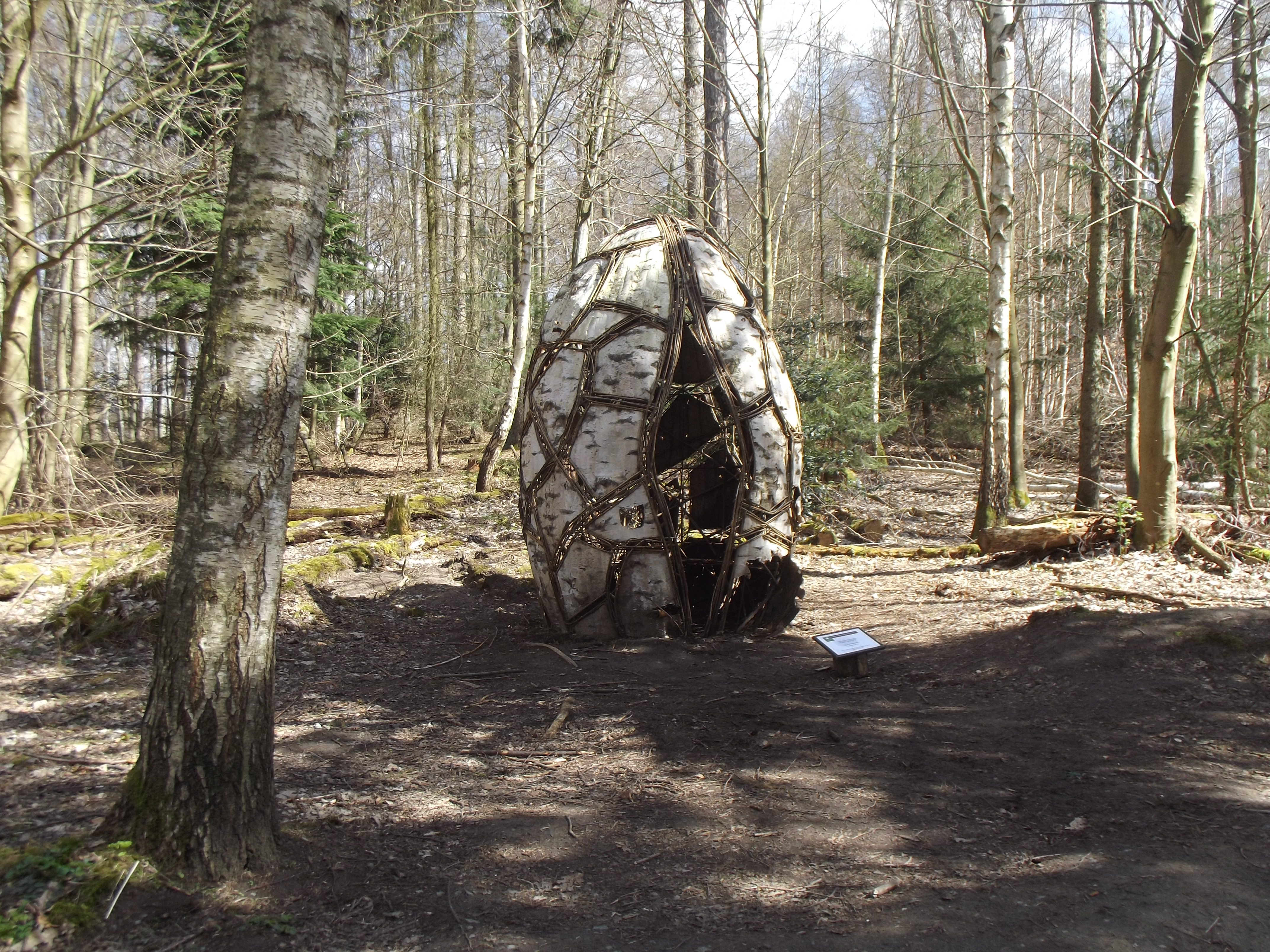 Internationaler Waldkunstpfad Darmstadt